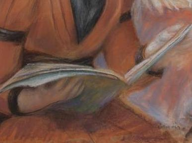 La Lecture (pormenor)